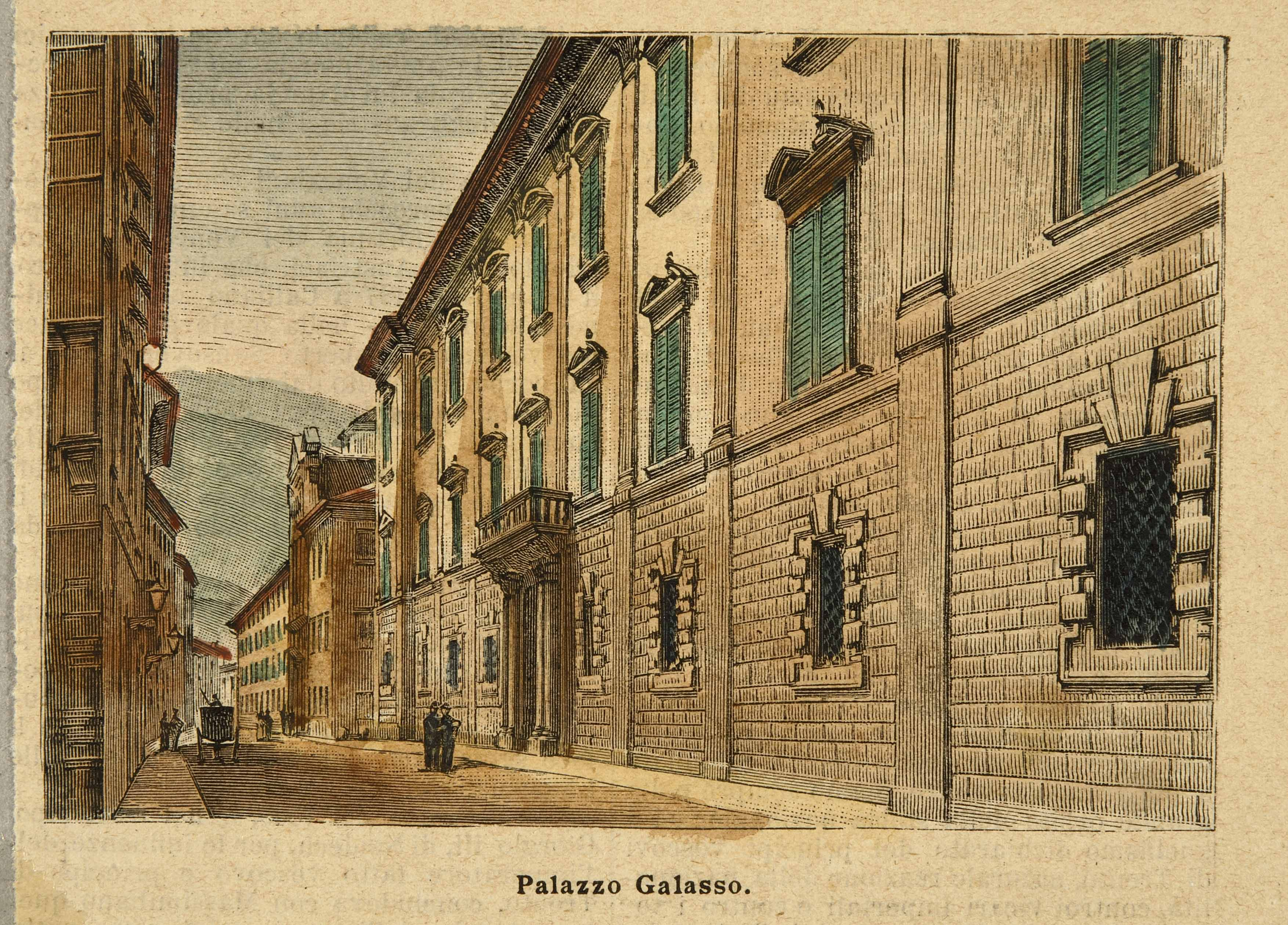 Xilografia. Pubblicata in Gustavo Chiesi, Le cento città d'Italia. ... Trento, Milano, Sonzogno, 1893.